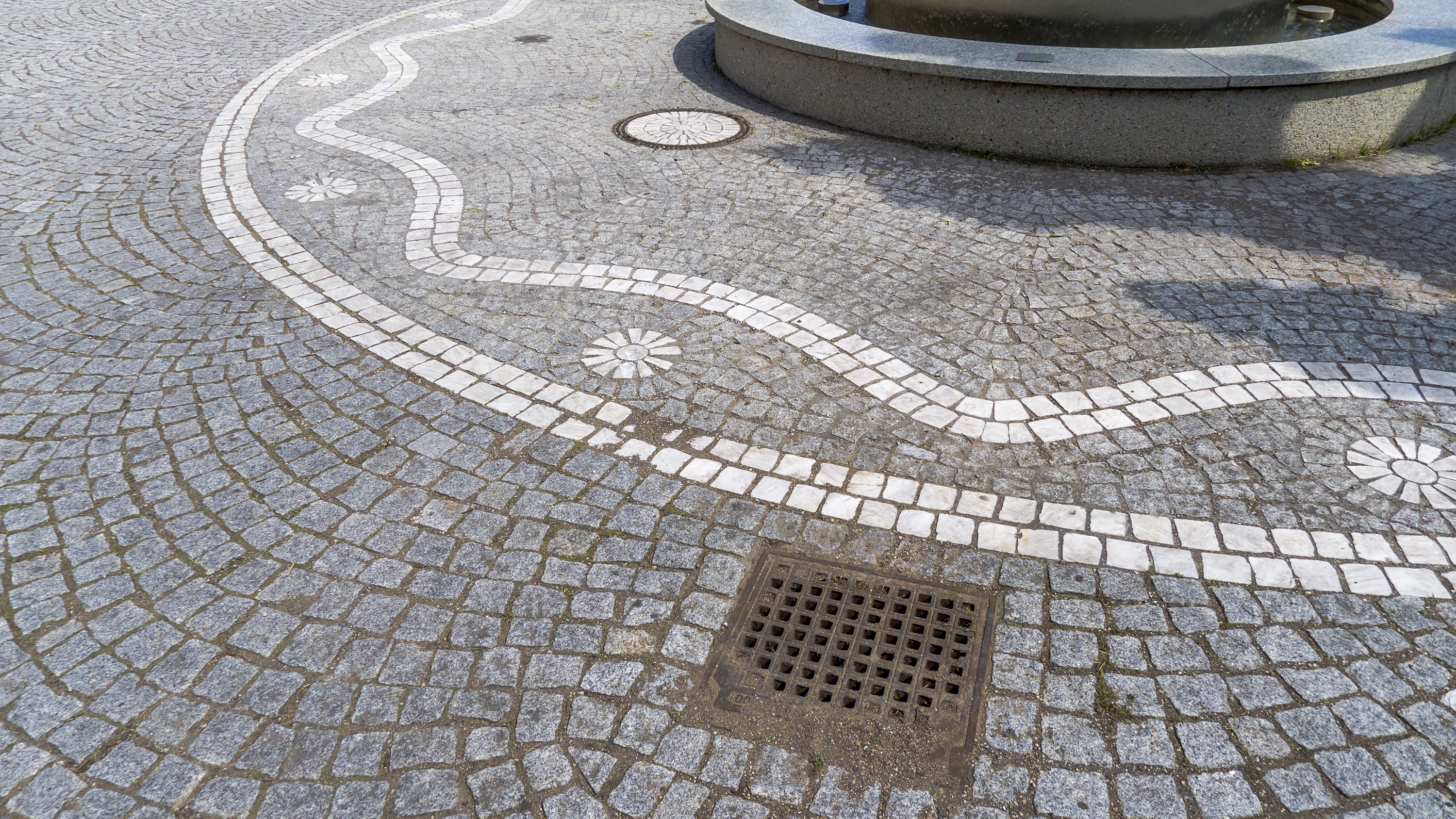 Pflasterung bei Wien 11 Simmeringer Hauptstraße 165 Richtung Norden